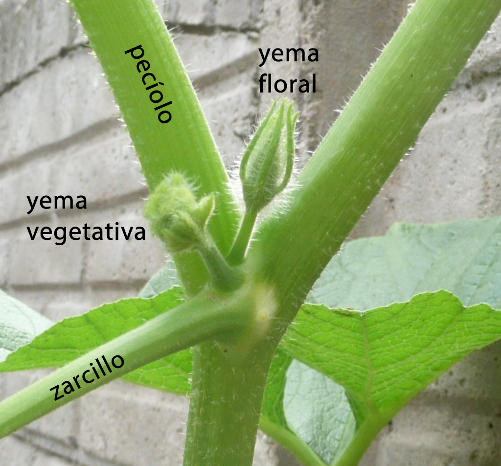 Con etiquetas.